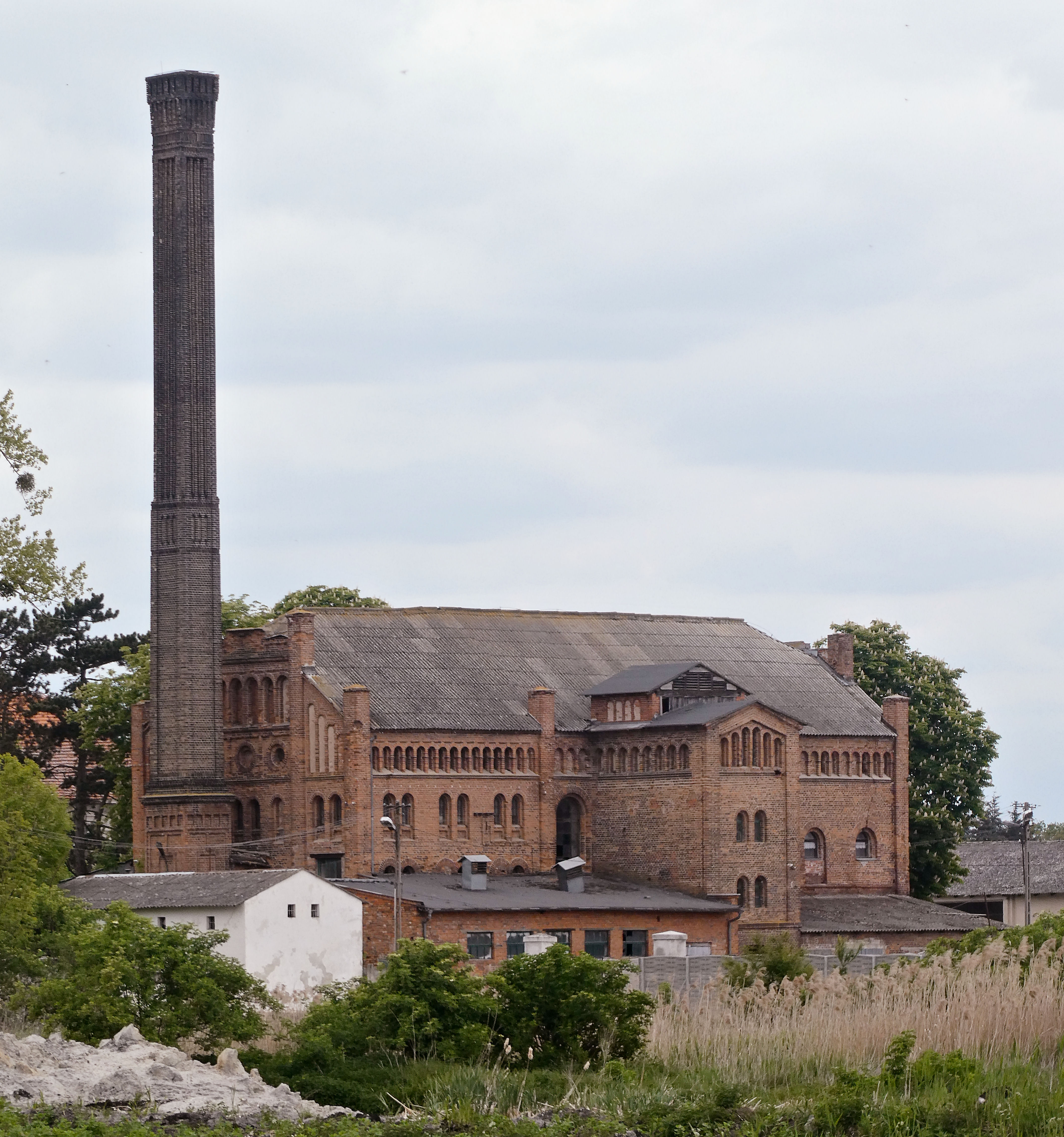 Śnieciska, gorzelnia)